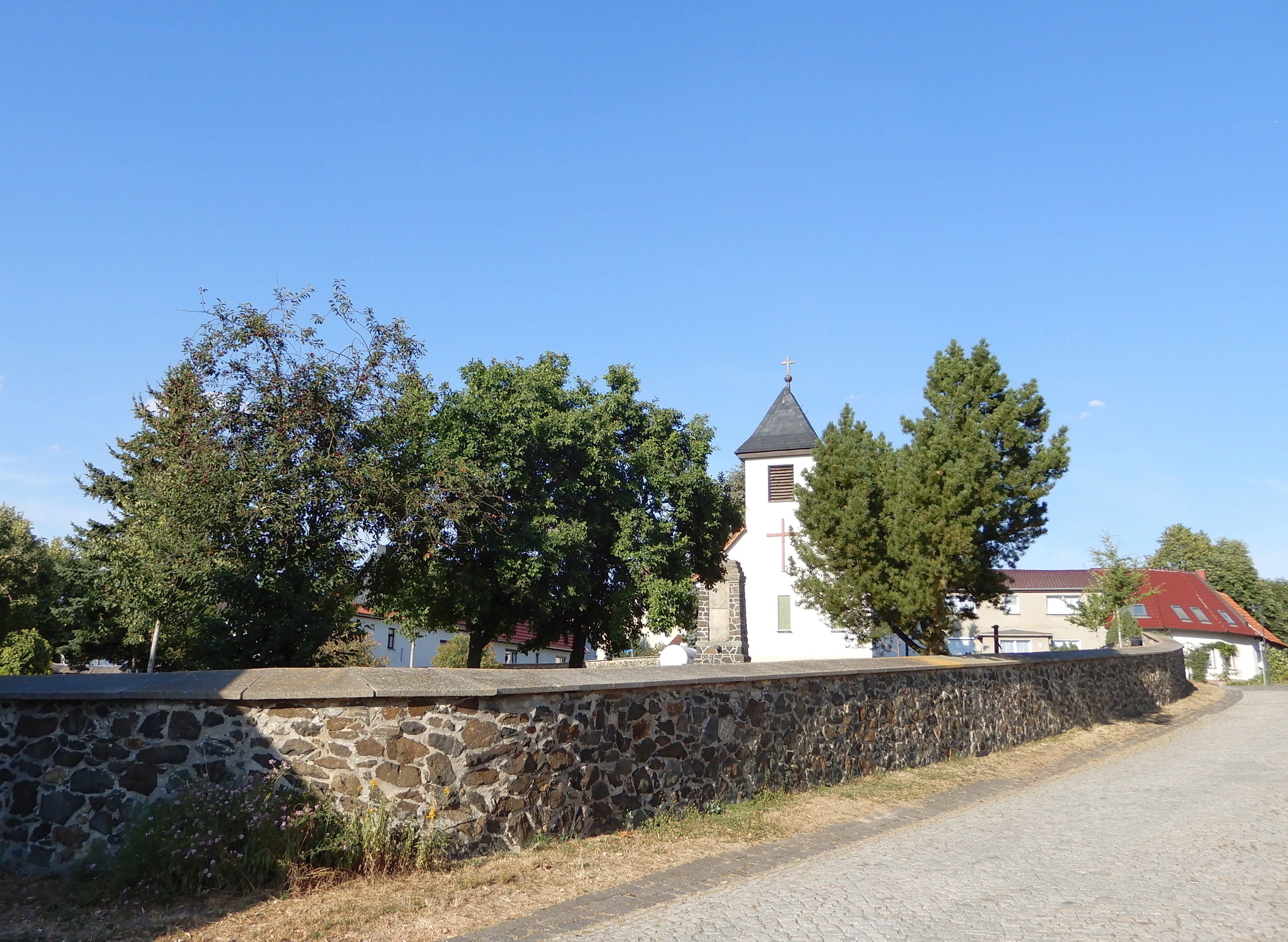 Umfassungsmauer des Kirchhofes